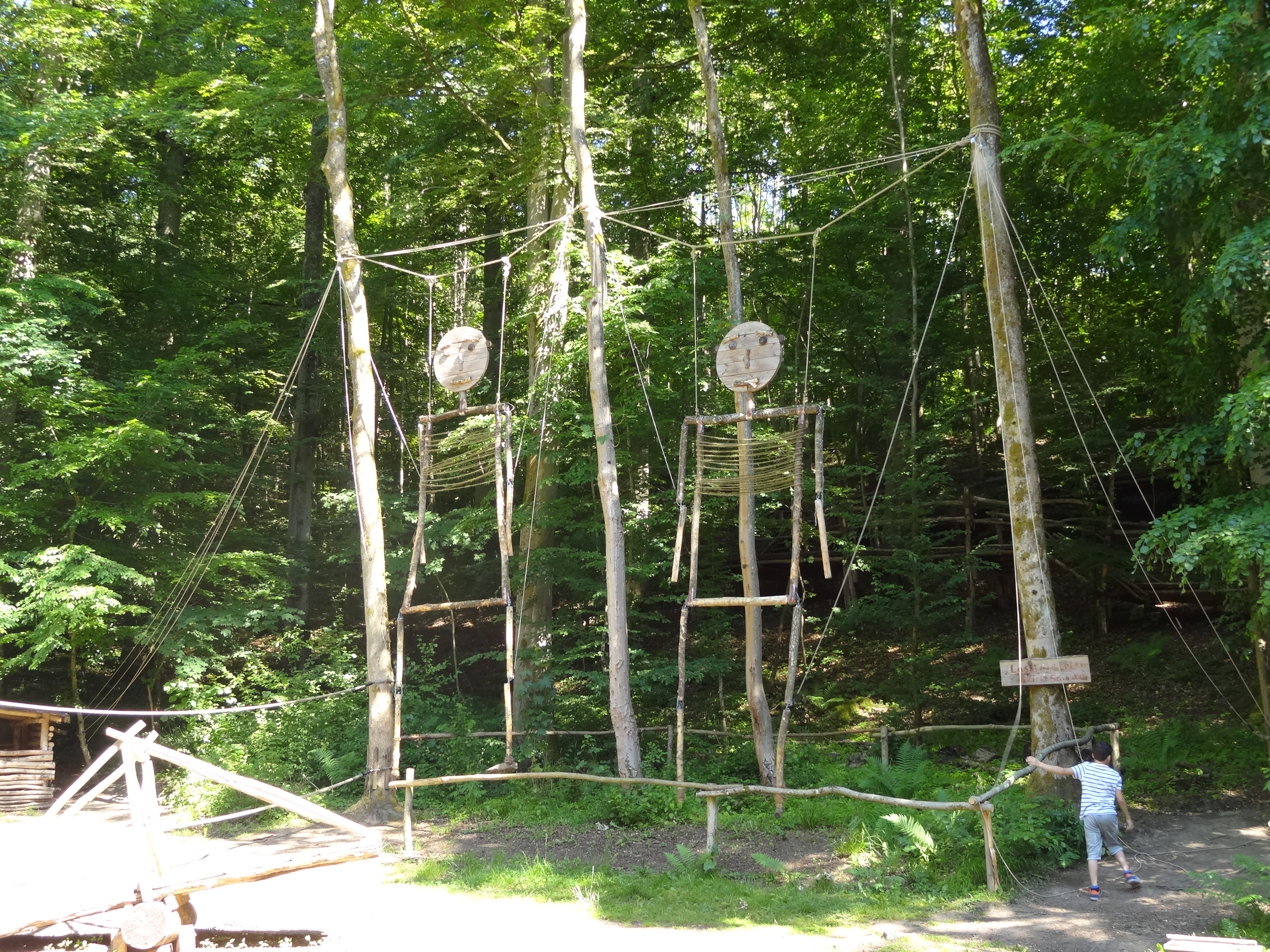 Grünes Meer